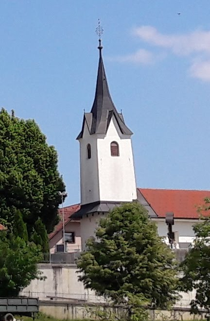 Naselje v Mestni občini Novo mesto